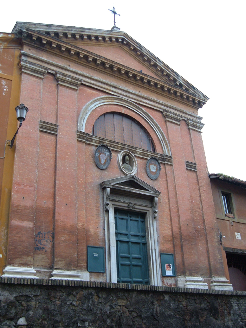 Chiesa di Sant'Eligio dei Ferrari, a Roma, nel rione Ripa. Foto personale.